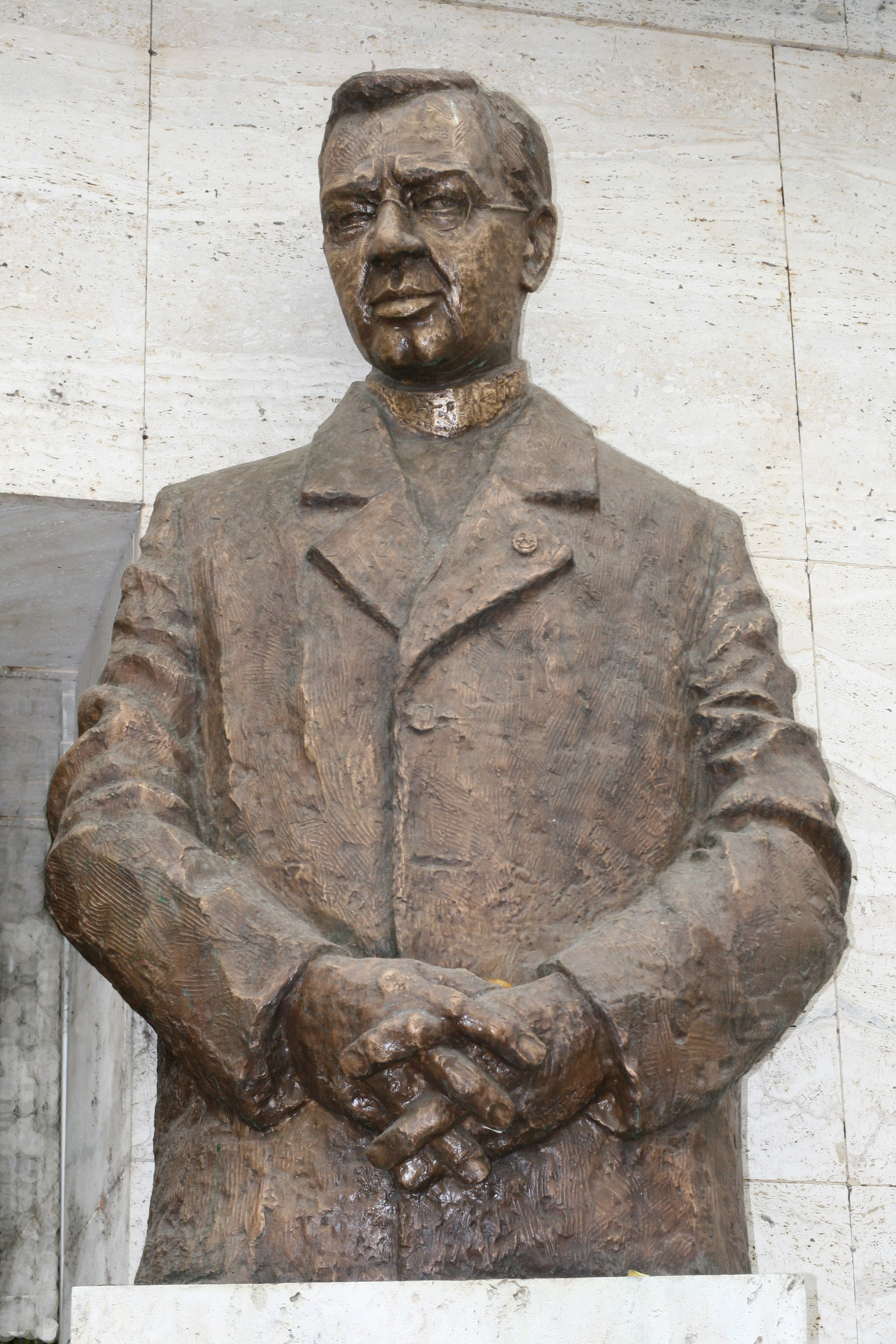 Bronzová plastika Štefana Furdeka